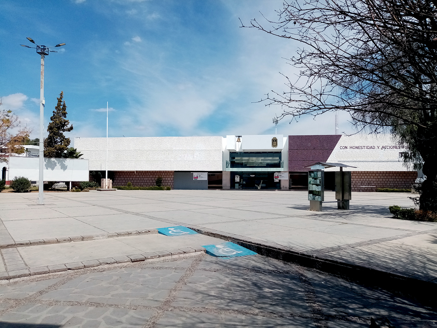 Presidencia Municipal de Guadalupe (Zacatecas)